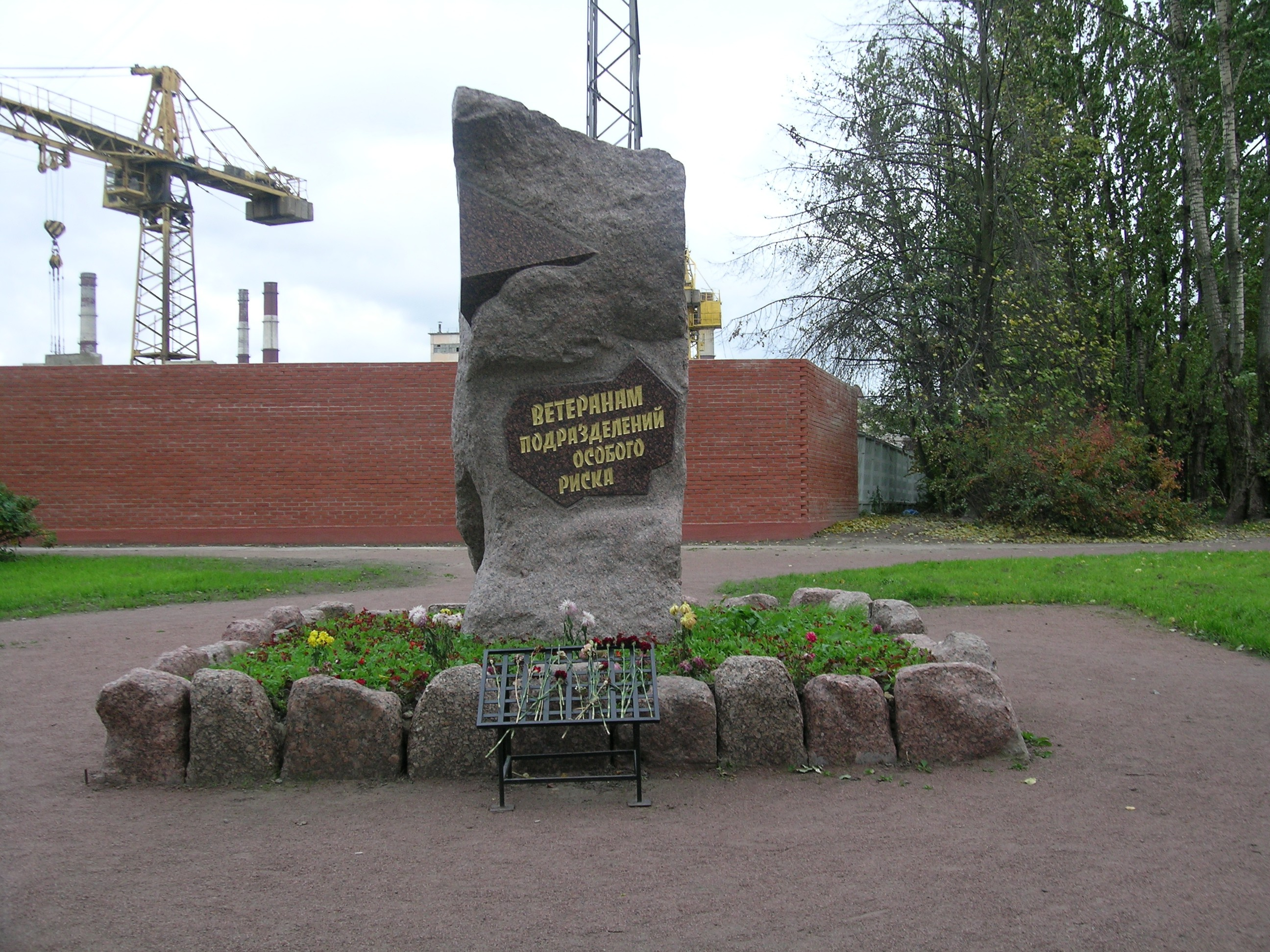 Памятник. Ветеранам подразделений особого риска. [1] на пересечении улиц Автовская и Примакова.